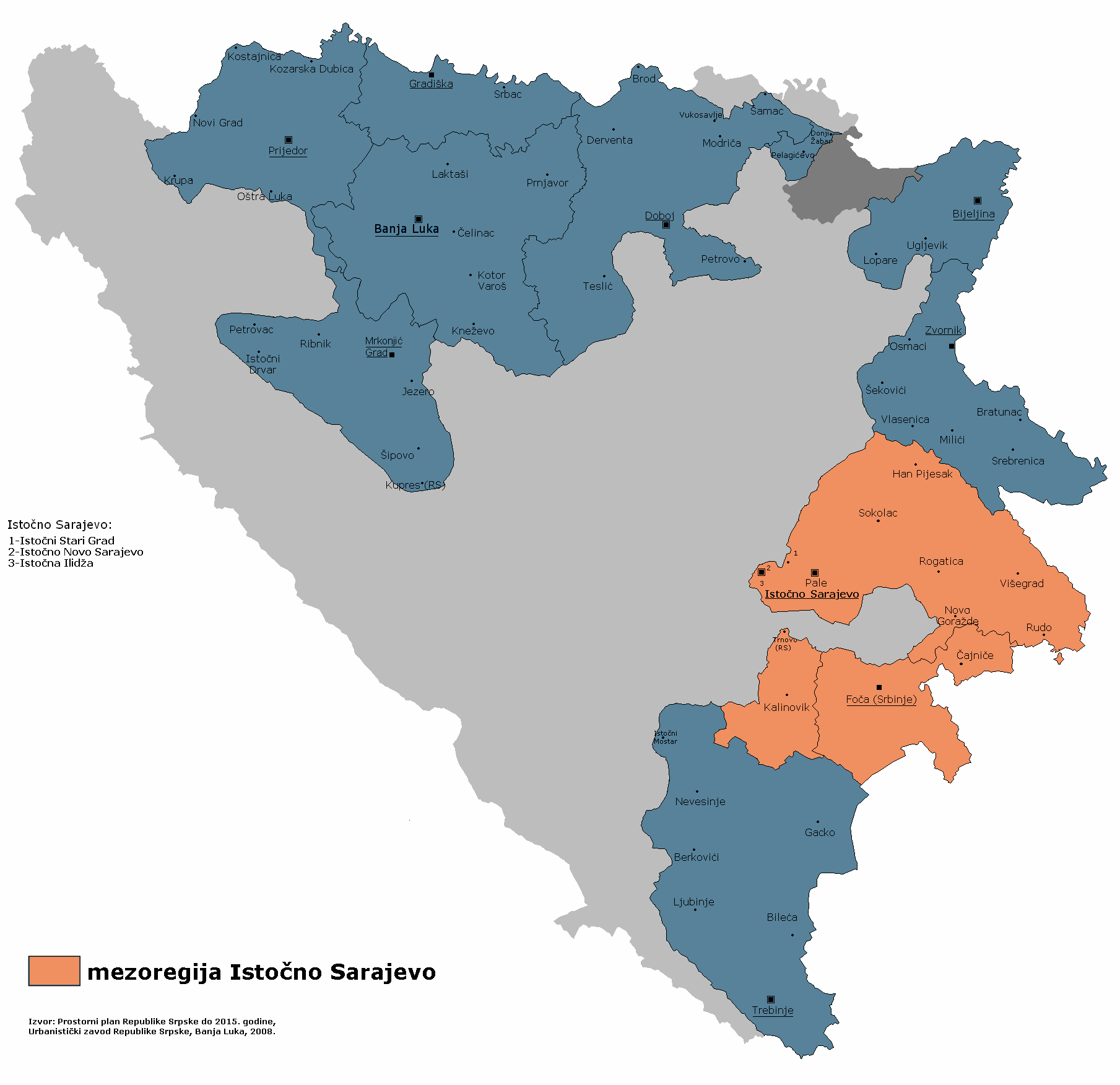 Мезорегија Источно Сарајево према Просторном плану Републике Српске